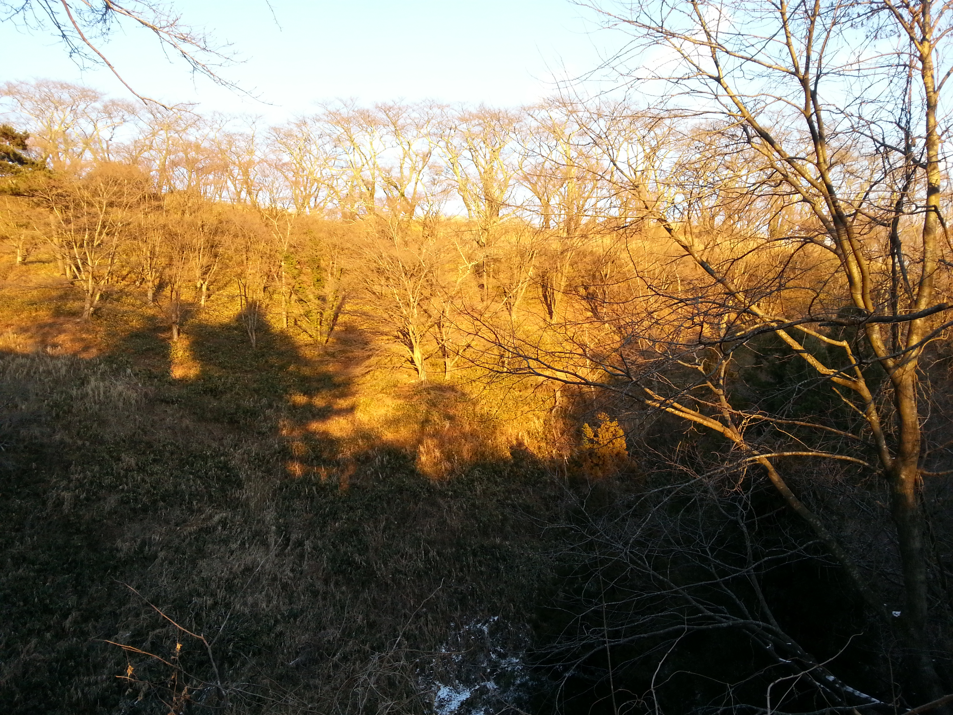 岩切城址入口の標柱より主曲輪方面を撮影